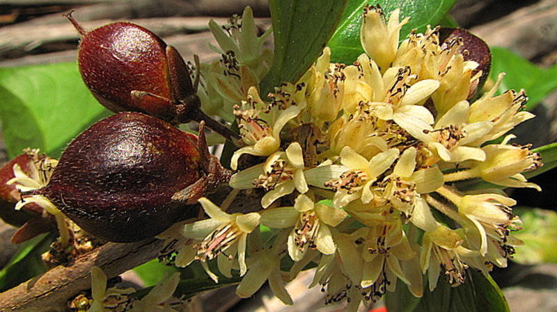 Casearia javitensis Kunth